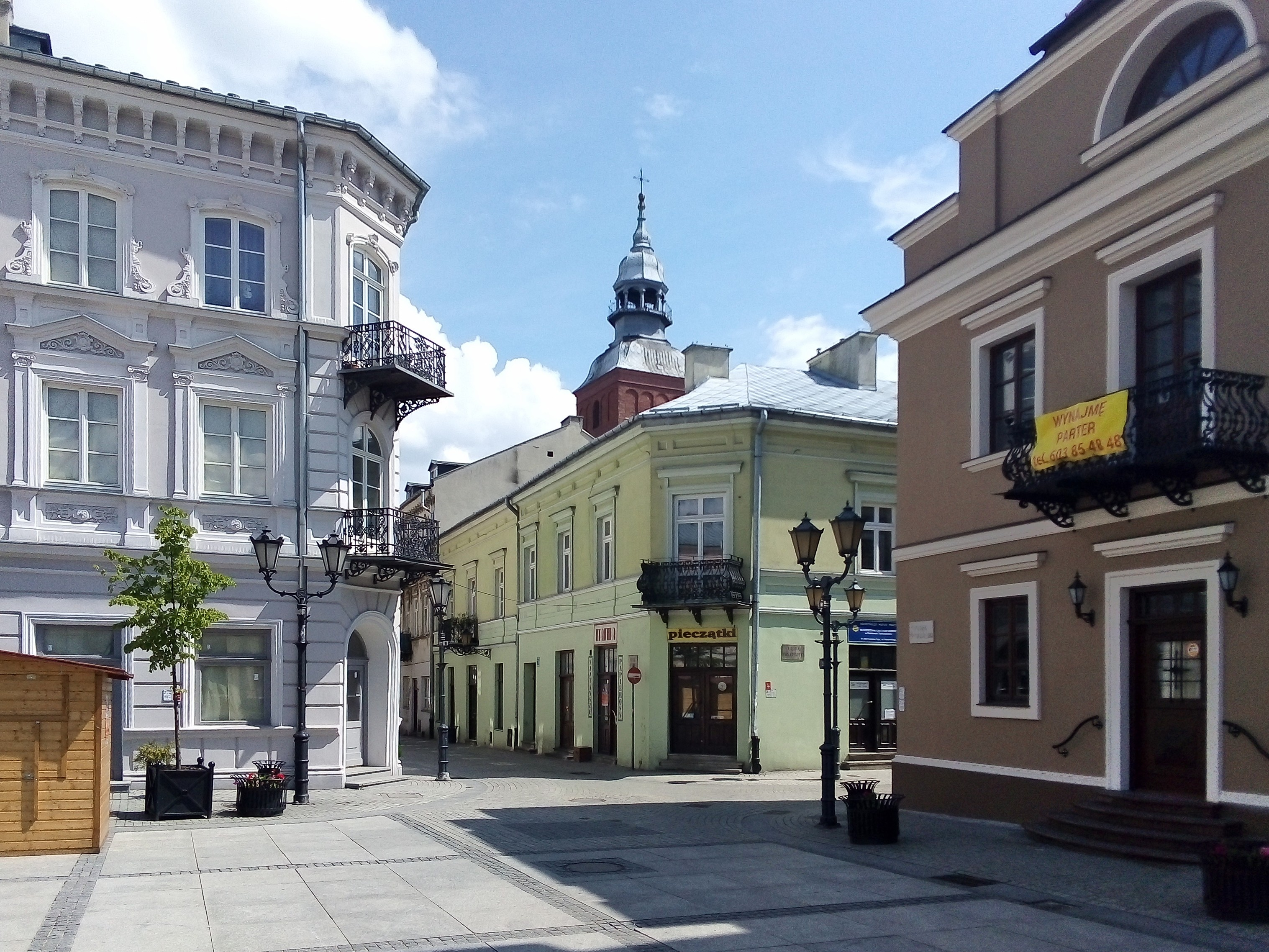 East-south corner of Market Square in Piotrków Trybunalski in Poland.